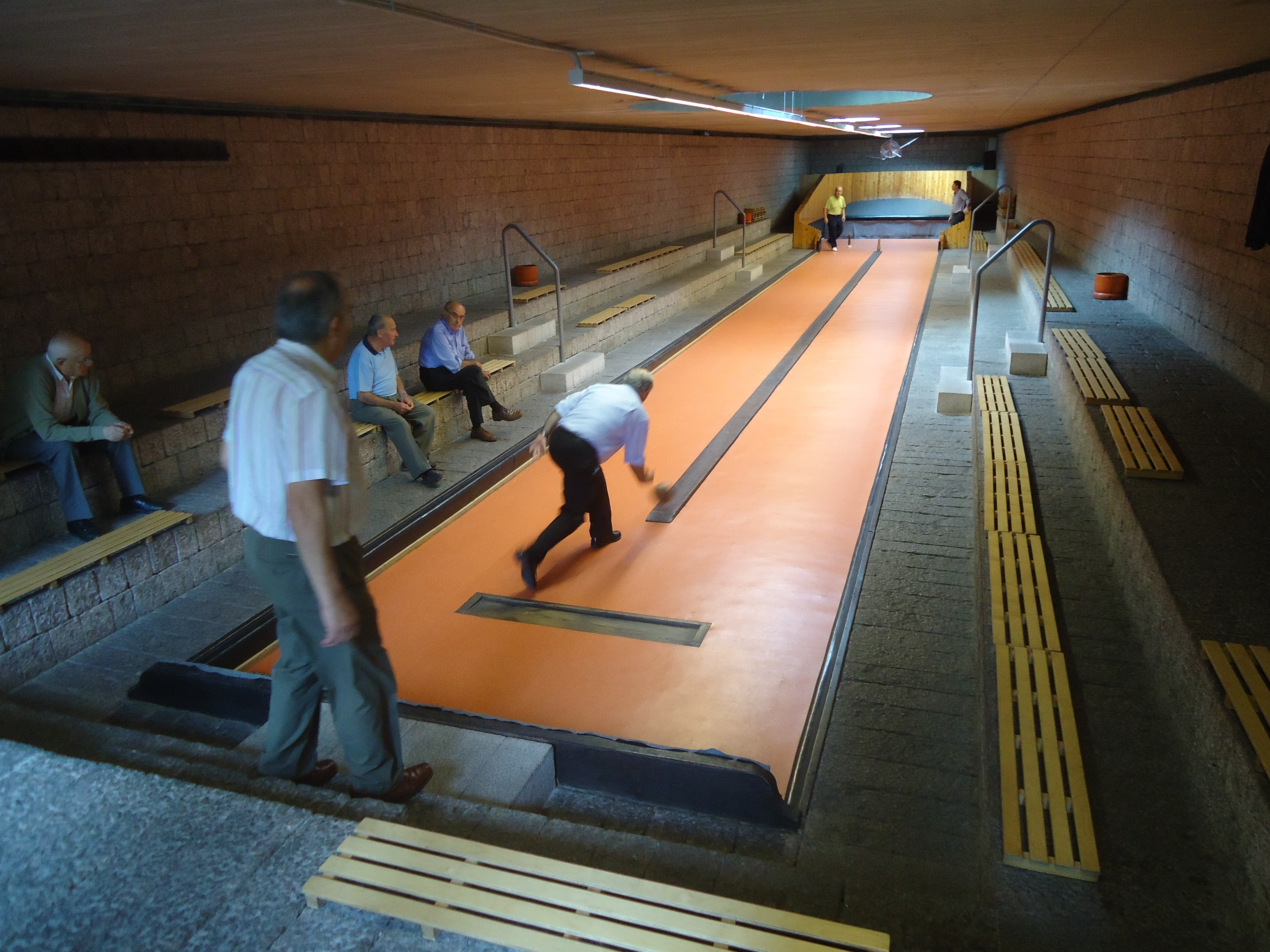 Arabar bola jokoa Gasteizko Foruen plazan